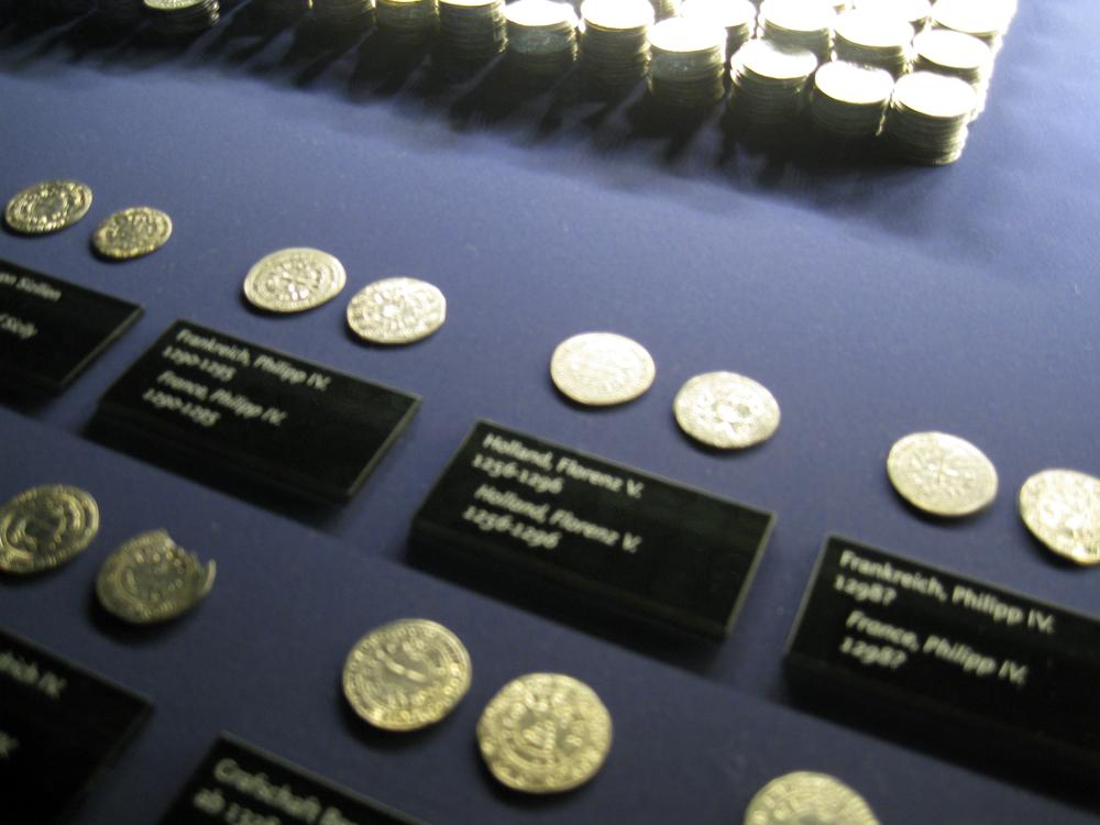 Münzschatz in der Alten Synagoge Erfurt